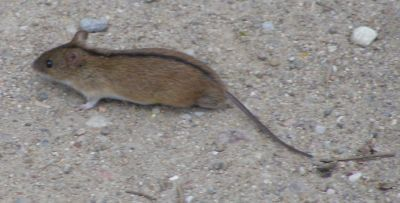 Apodemus agrarius